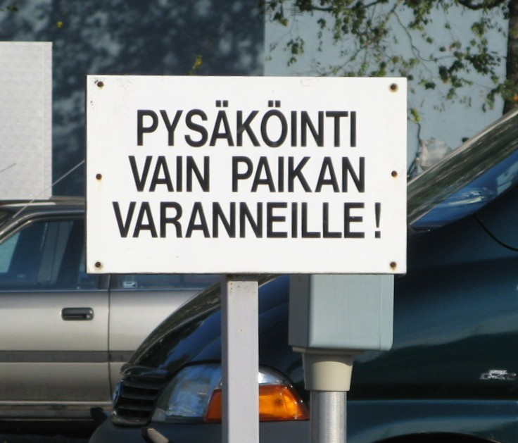 Schild "Parken nur für die, die einen Platz reserviert haben"